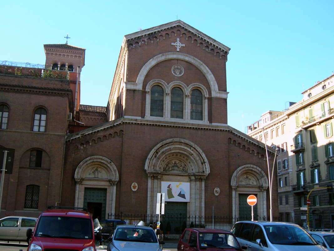 Chiesa di Ognissanti, a Roma, nel quartiere Appio Latino.